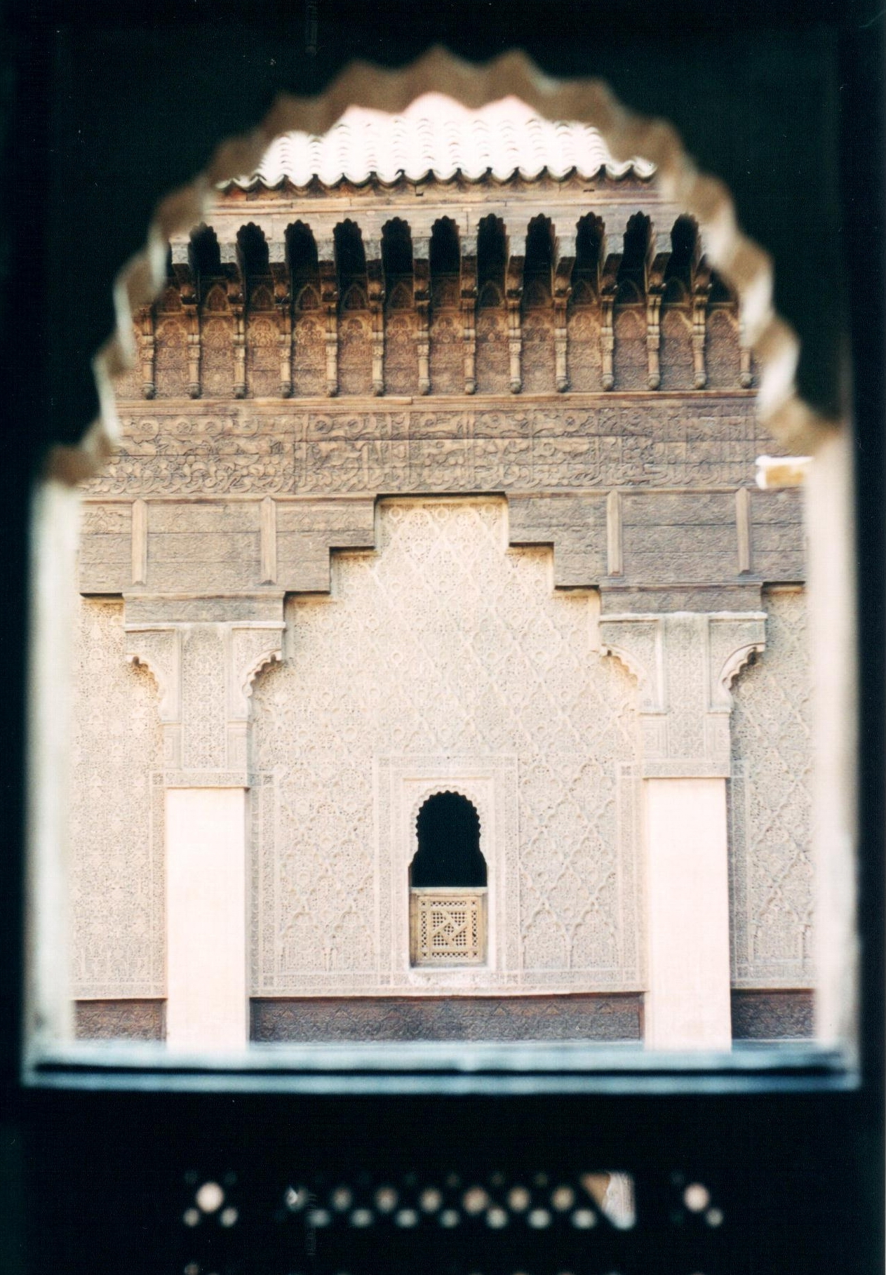 Decorazioni, dalla finestra di una celletta. Medersa Ben Youssef, Marrakech, Marocco.